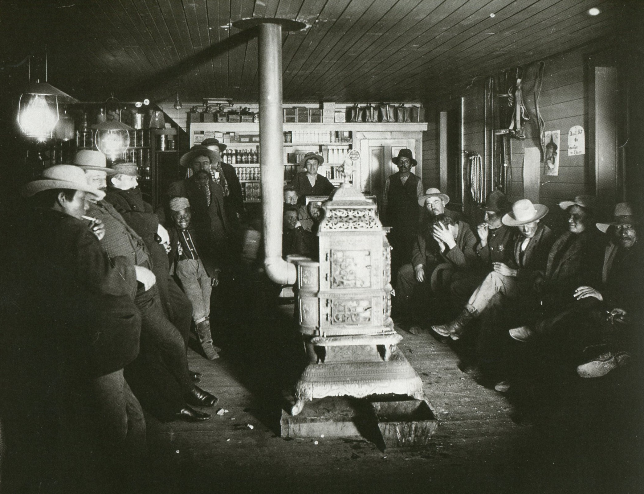 Jordans handelsstation i rosebud-reservatet 1893